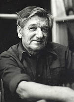 Kazimierz Ostrowski okolo 1975 roku